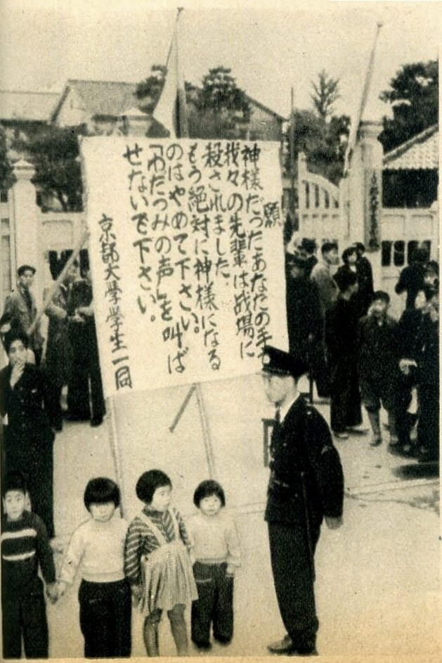 京大天皇事件。校門の前に、学生により天皇へのお願いを書いた看板が立てられた。これとは別に、同学会が天皇に渡そうとしていた公開質問状が問題になった。